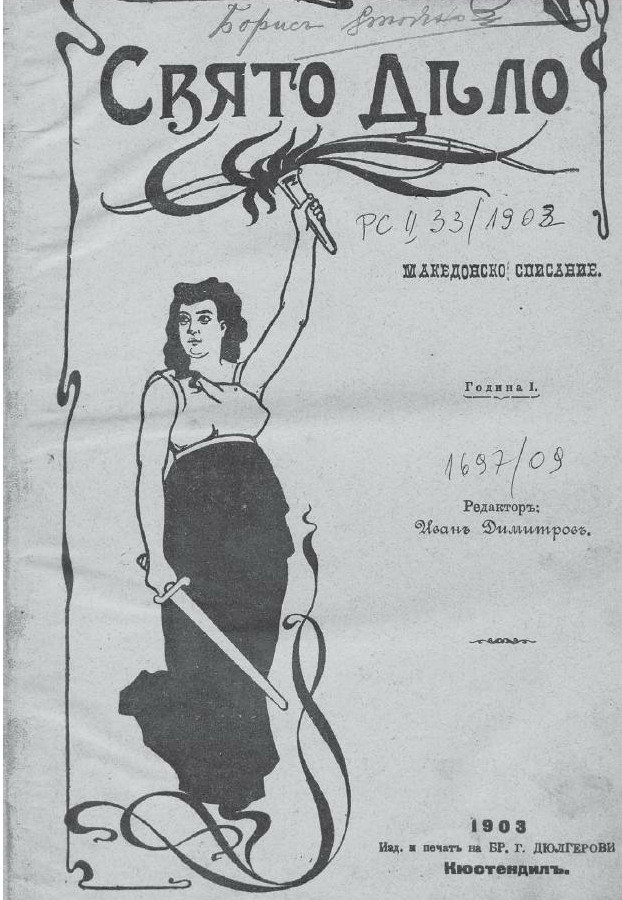 Списание "Свято дело".